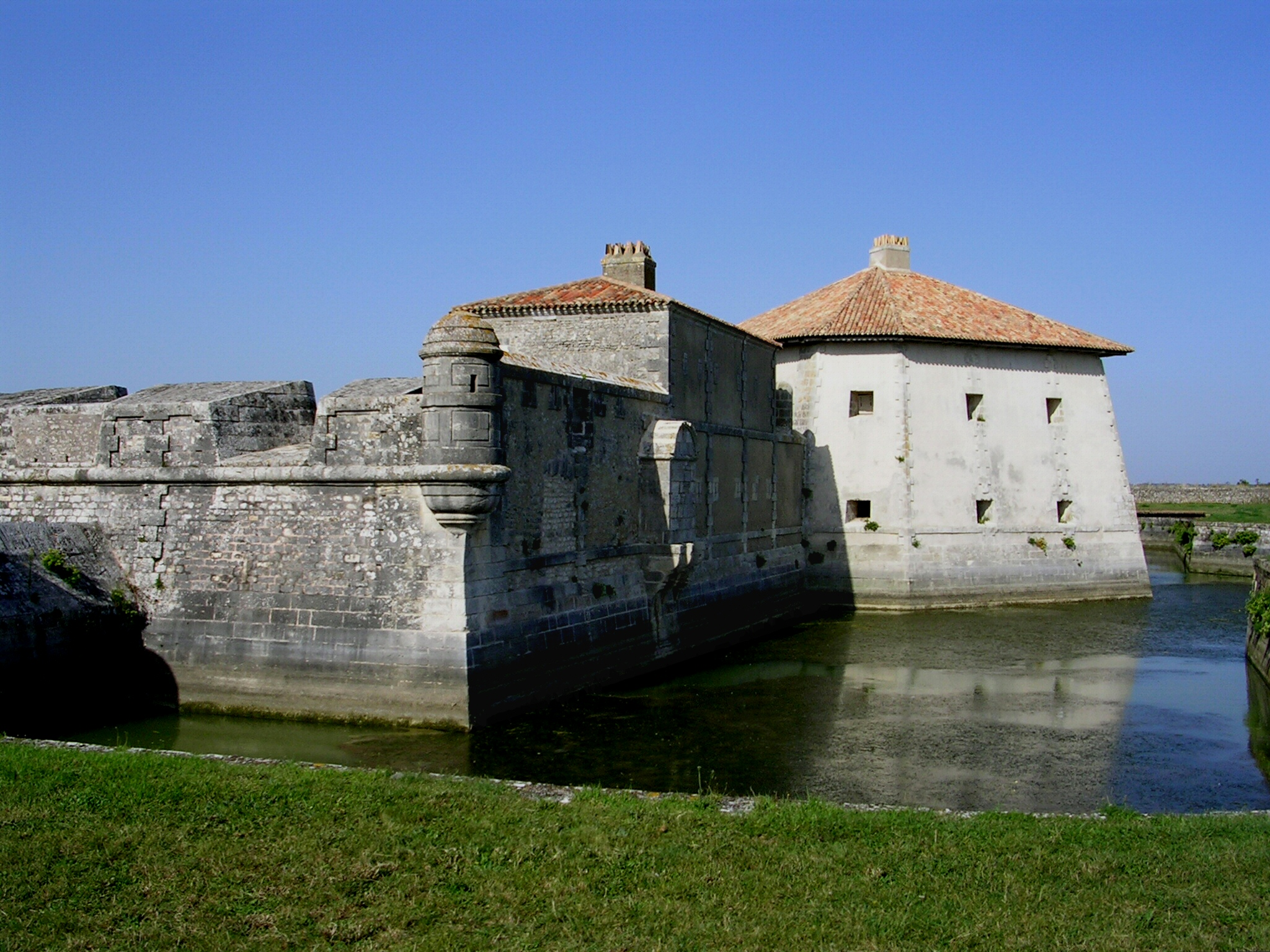 Le Fort Lupin à Saint-Nazaire-sur-Charente .